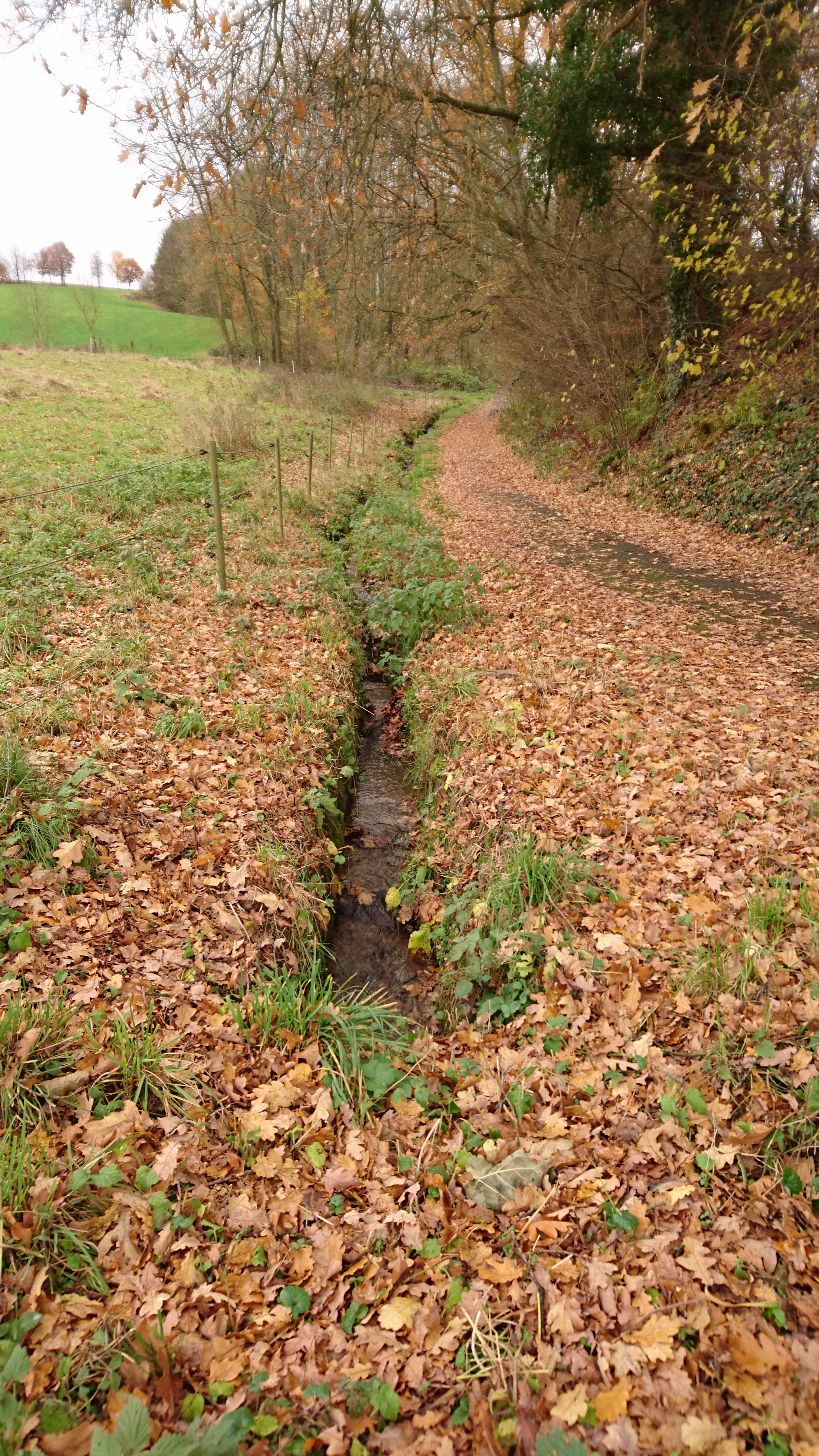 Feuchtgebiet Untermiebach (Overath)